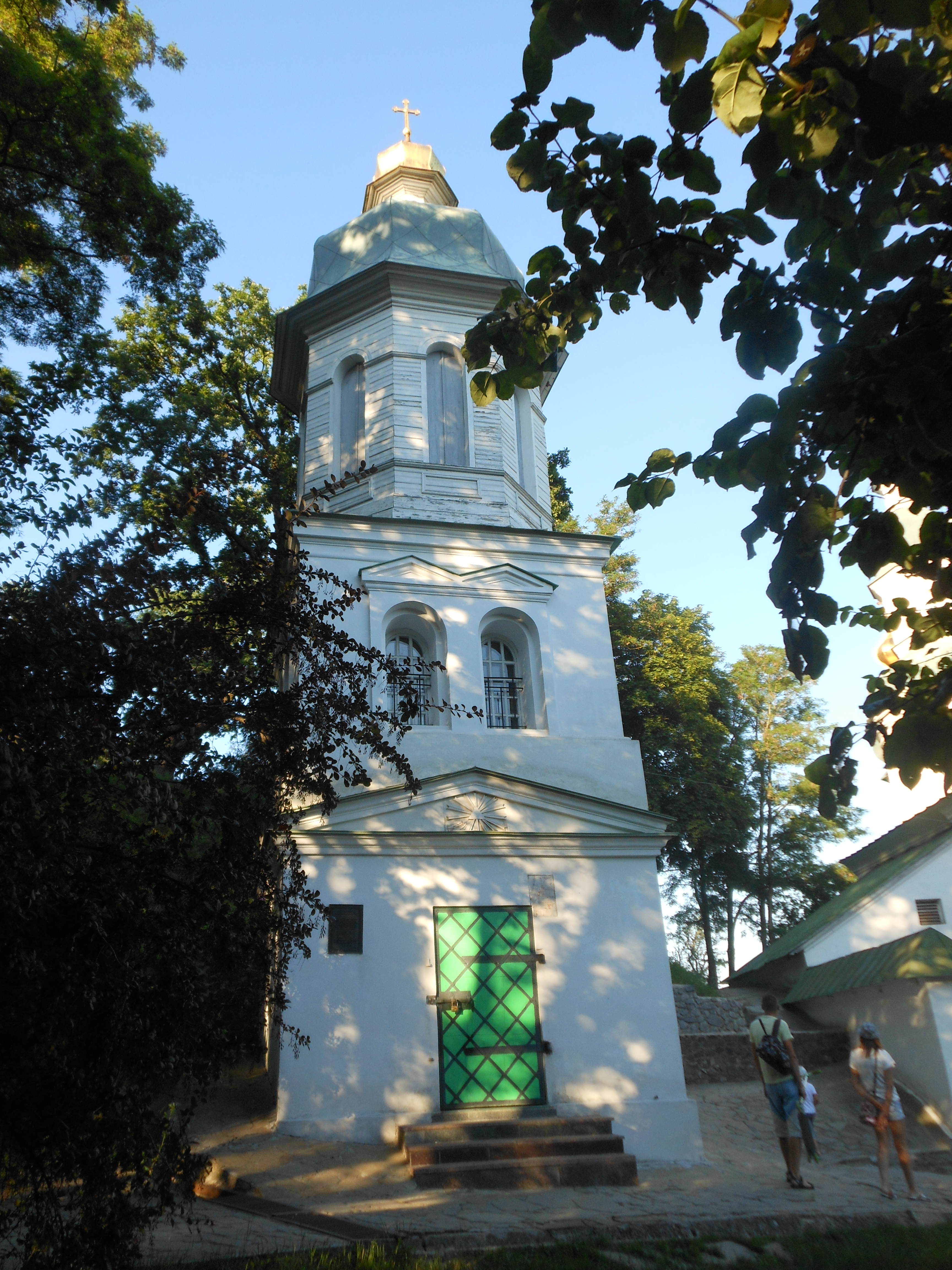 Дзвіниця (зміш.), Чернігів, вул.Г.Успенського, 33